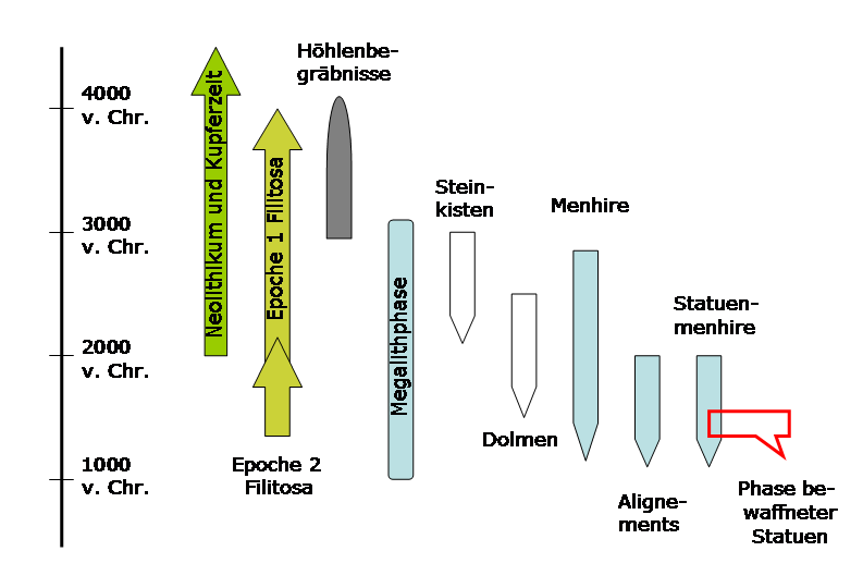 Korsika neolithisch